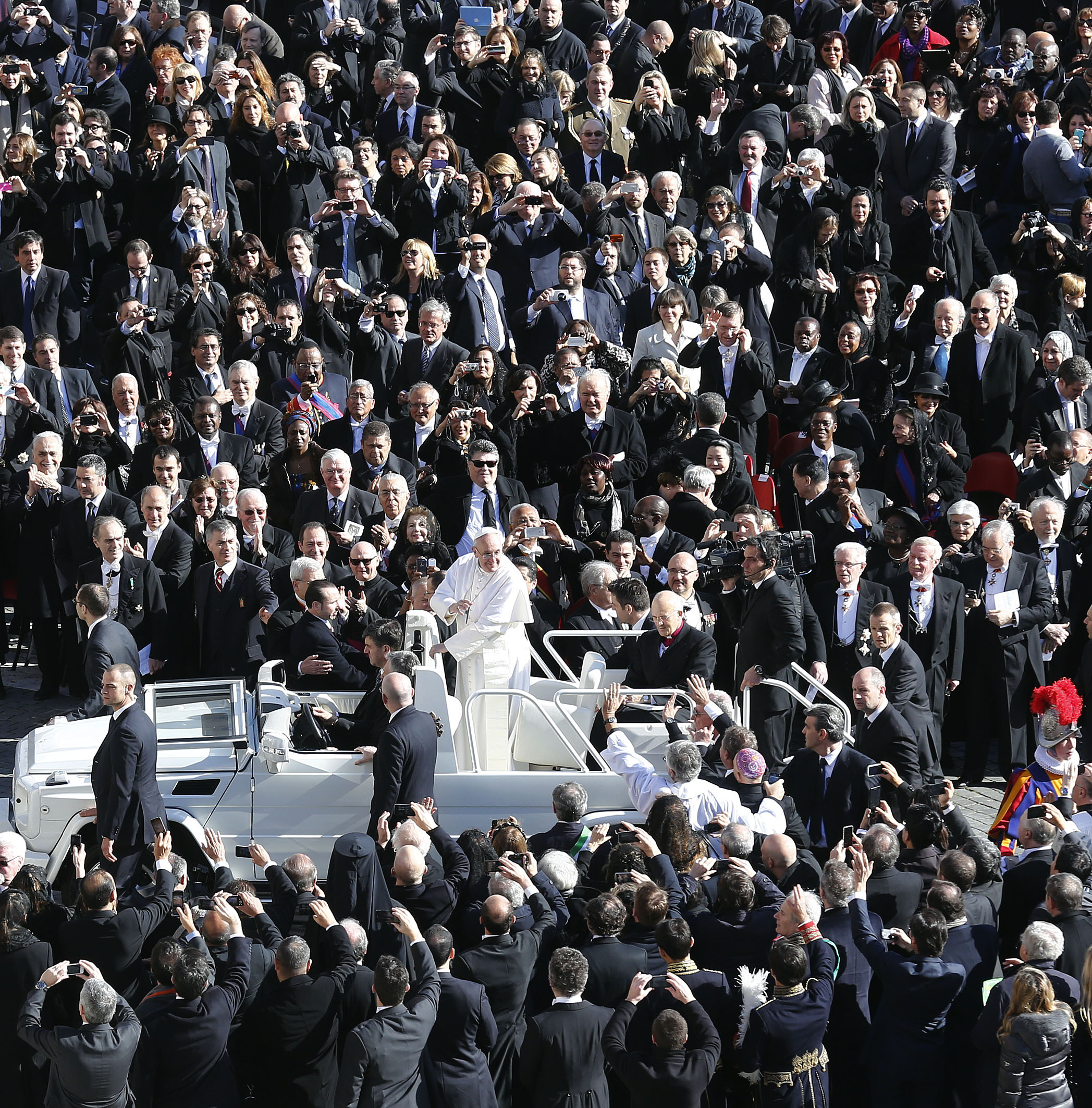 Teilnahme von BP Heinz Fischer, BK Werner Fayman und VK Michael Spindelegger an der Inauguration von Papst Franziskus, Vatikan, 19.03.2013, Foto: Dragan Tatic